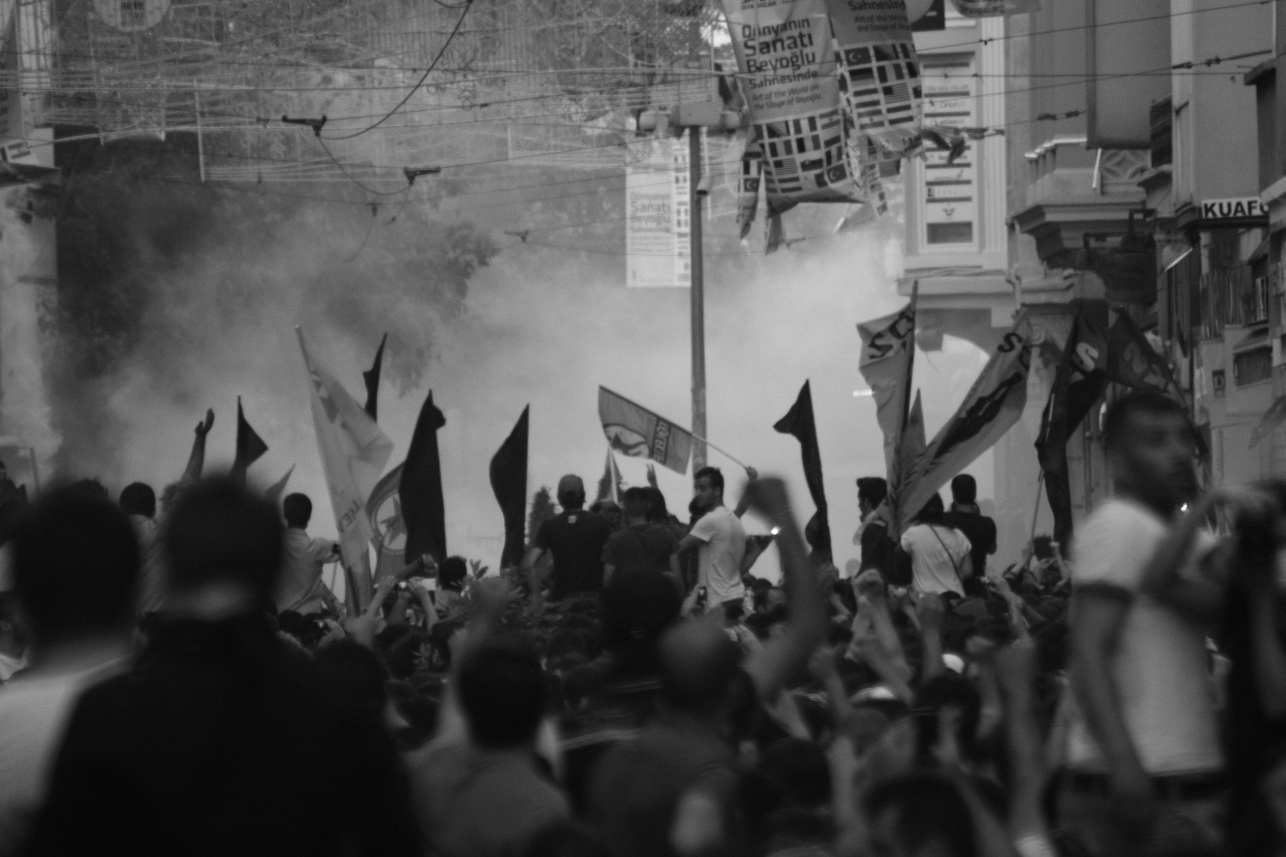 2013 Taksim Gezi Parkı protestoları, İstiklal Caddesi, 31 Mayıs